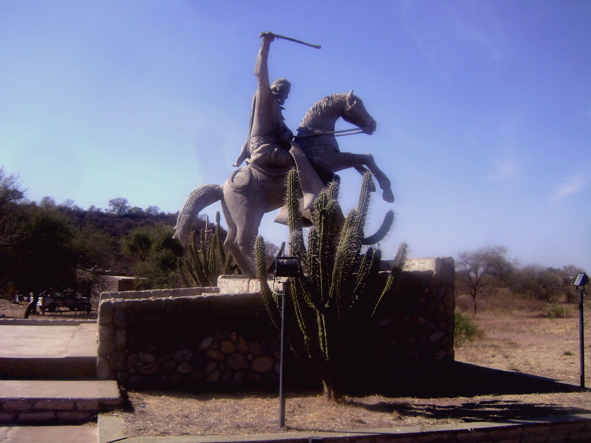 Monumento al Chacho Peñaloza, a la entrada norte de Olta. La Rioja. Argentina